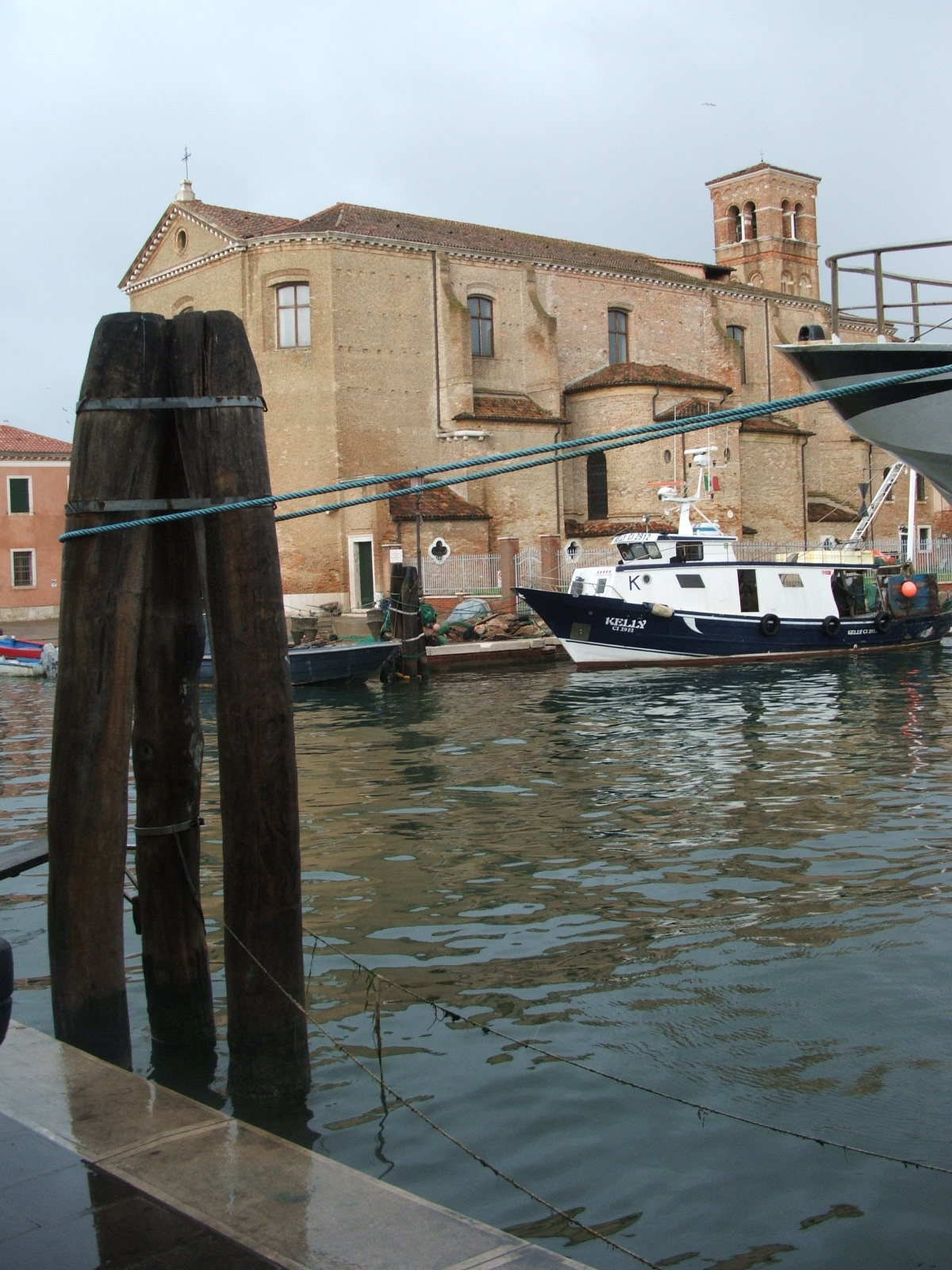 Chioggia, laguna veneta